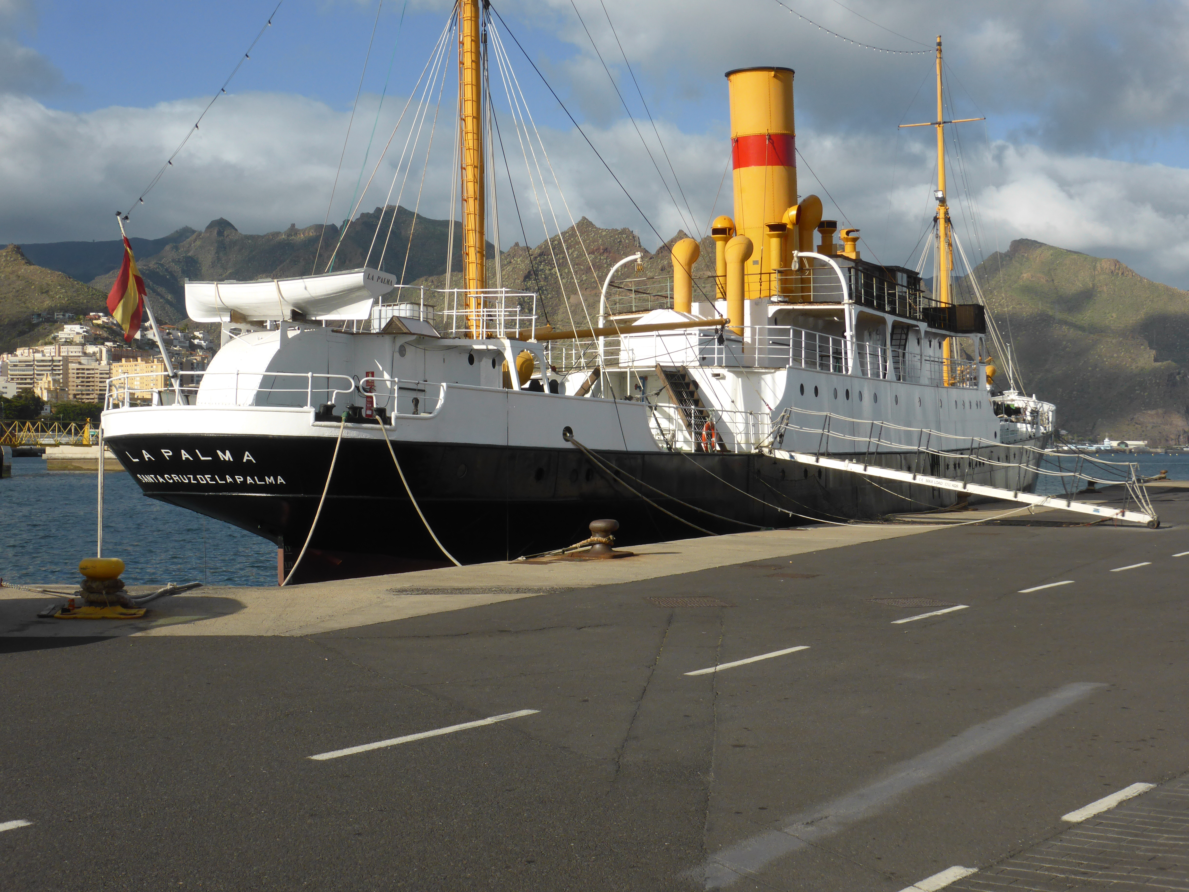 Centenario correíllo La Palma, construido en el año 1912, para la antigua "Compañía de Vapores Correos Interinsulares Canarios". A partir de 1930 perteneció y recibió los colores de la "Compañía Trasmediterránea".